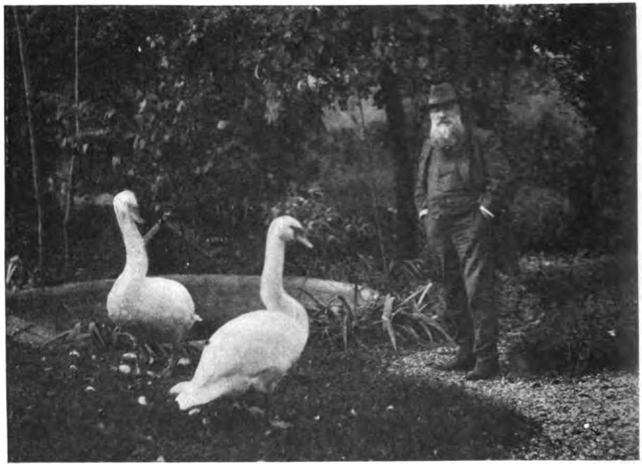 Jardin d'Auguste Rodin à Meudon. Paru dans le livre L'Art, entretiens réunis par Paul Gsell, Grasset, 1911. page 10